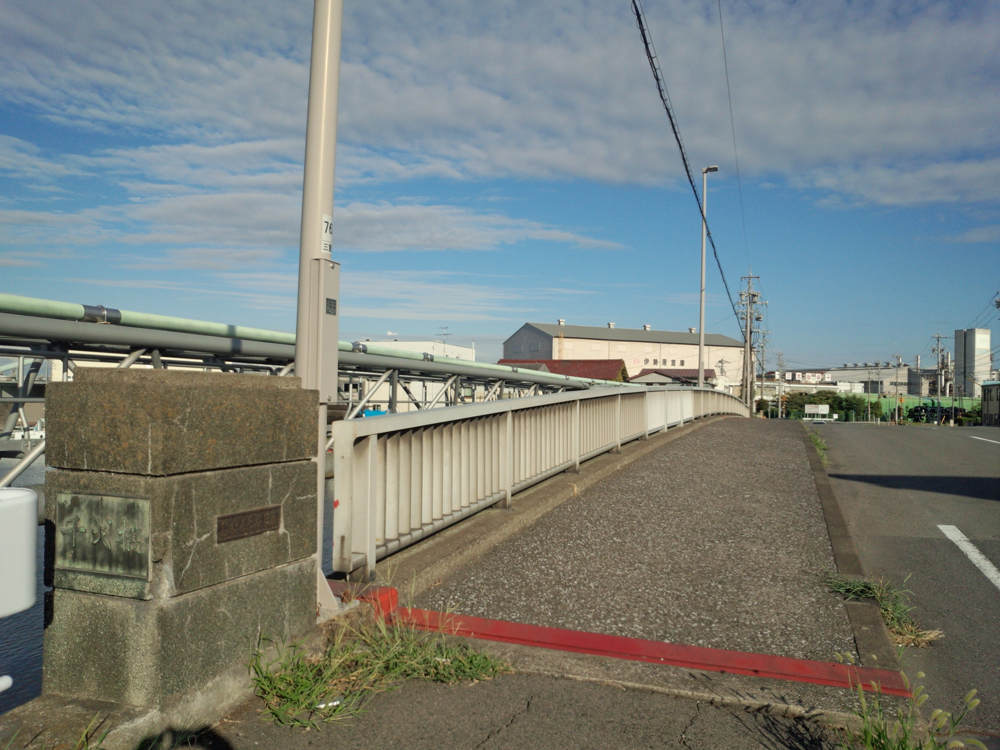 1945年8月8日、四日市に投下された模擬原爆の着弾地・千歳橋